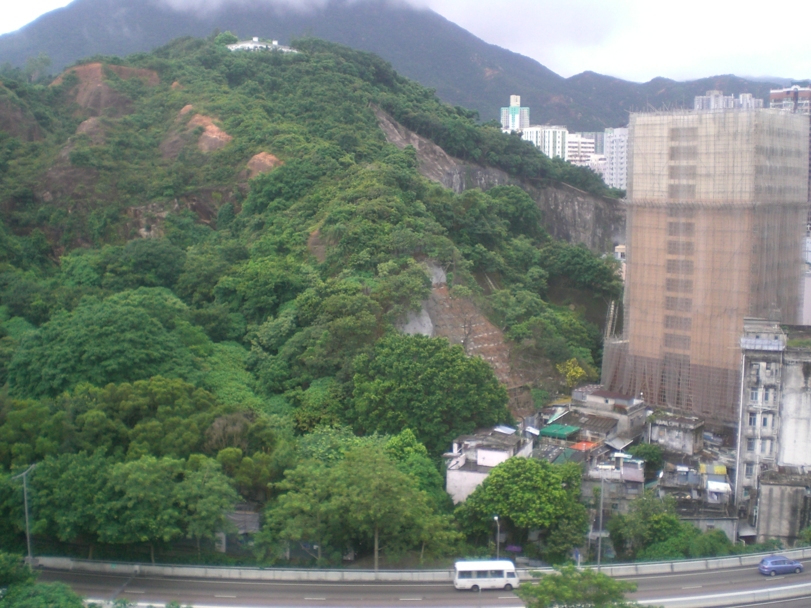 筲箕灣阿公岩山頭zh:陰天